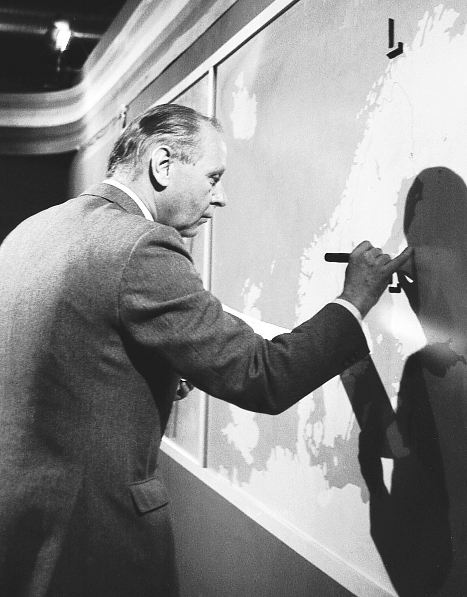 John Pohlman ritar lågtryck på Stockholmsmässan "Vision 86"